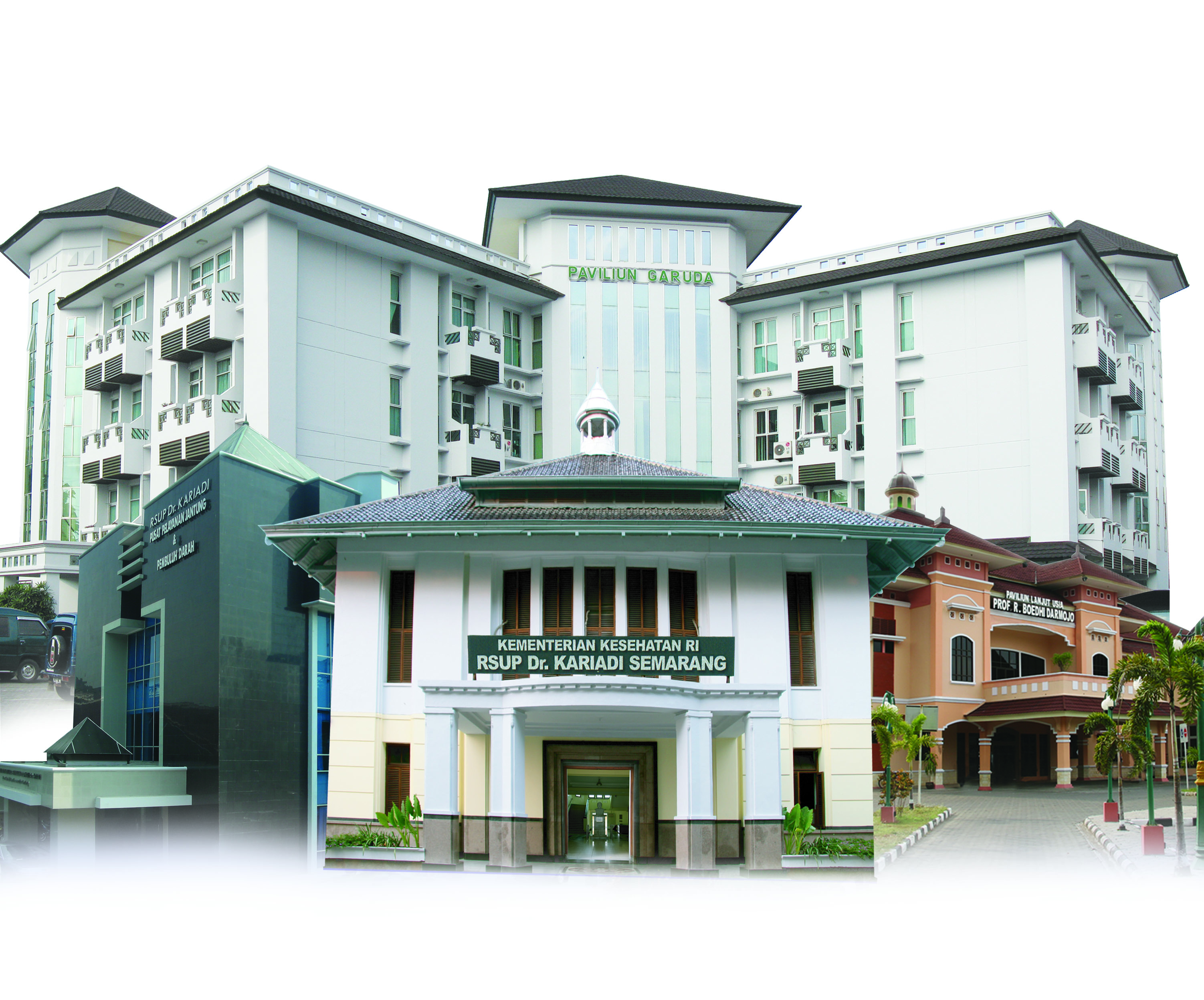 Rumah Sakit Umum Pusat Dr.Kariadi Semarang